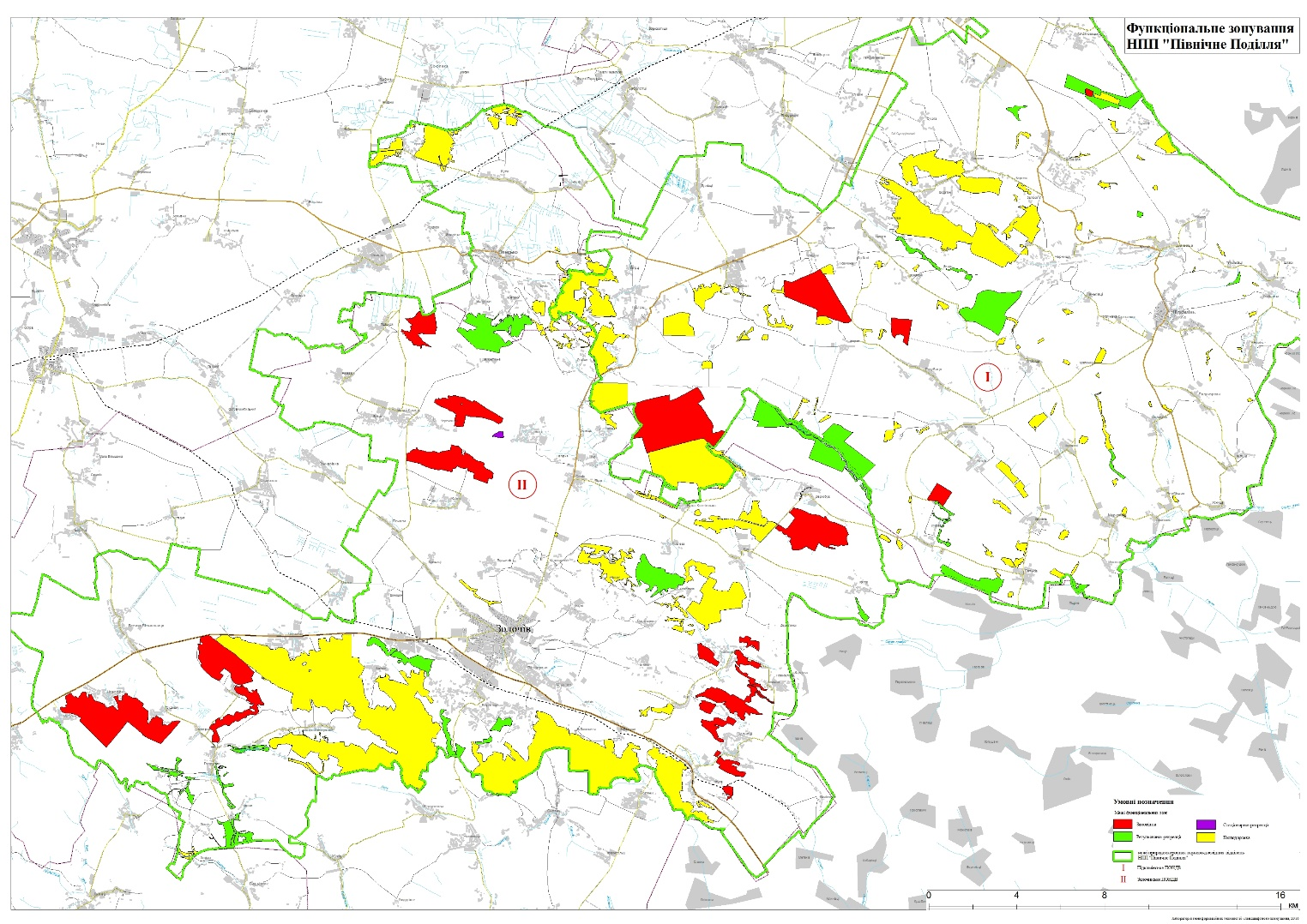 Northern Podolia National Nature Park